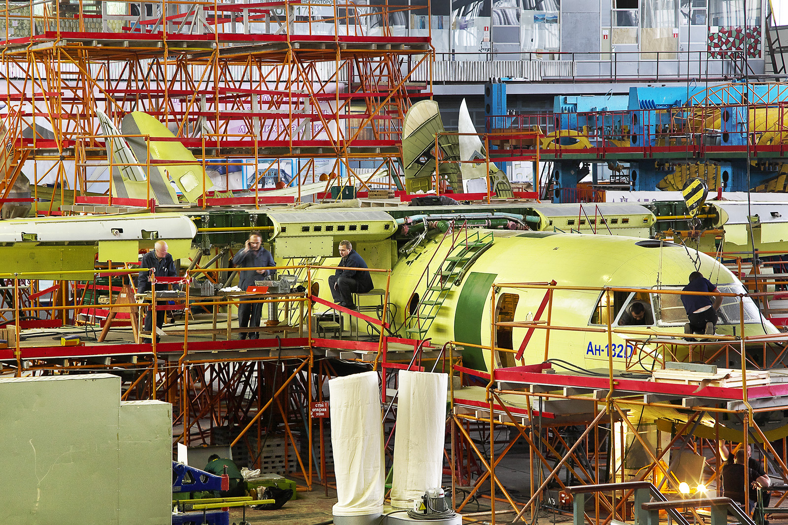 Antonov Design Bureau Svyatoshino - Kiev - (UKKT) Antonov An-132D cn 001 Ukraine, Май 17, 2016